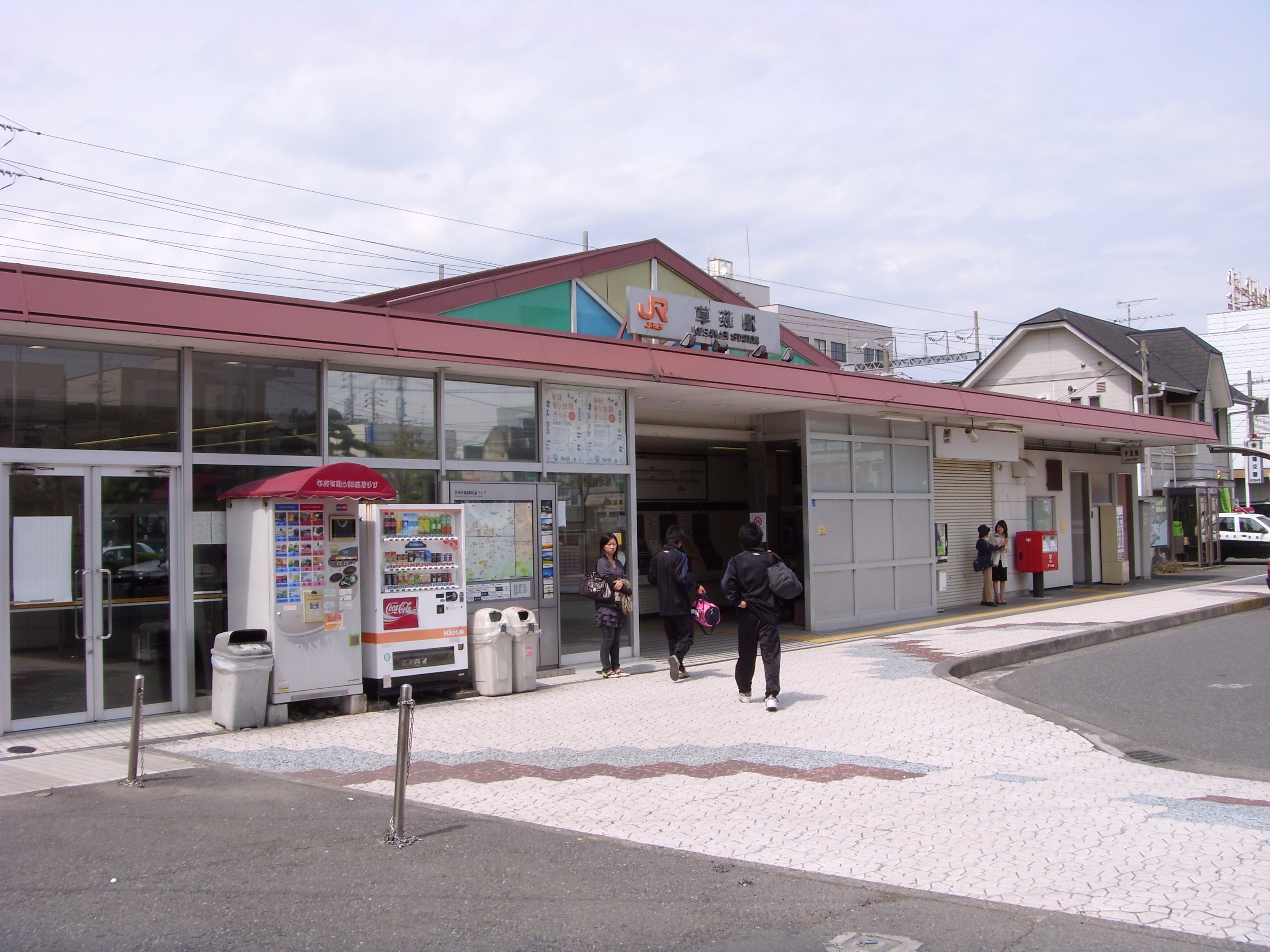 Kusanagi Station (JR Central)